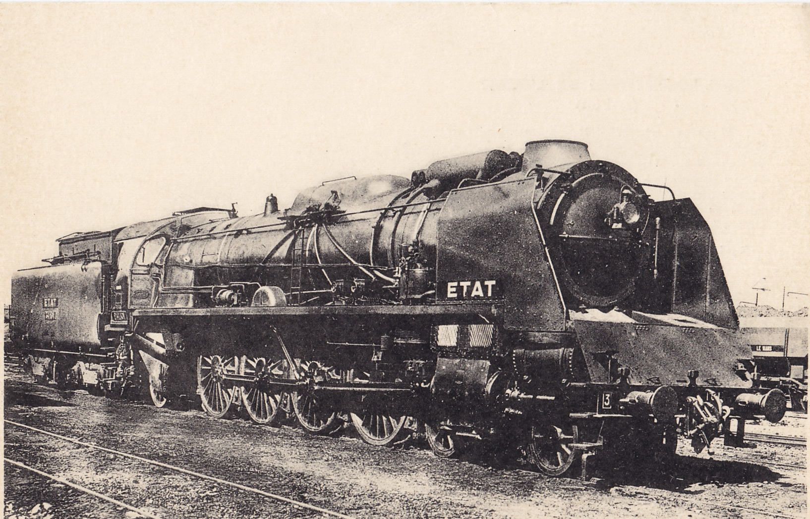 Carte postale ancienne éditée par H. M. P., 8 rue de Tournon à Paris, n°366 : Locomotives de l'Ouest (ex-Etat) - Machine n°241-101 à surchauffeur Schmidt, à 3 cylindres à simple expansion, distribution Renaud, réchauffeur ACFI, type "Mountain" pour trains rapides lourds. Construite en 1932-33, reconstruite en 1945 en 2 D 2 compond à 4 cylindres. Dépôt du Mans